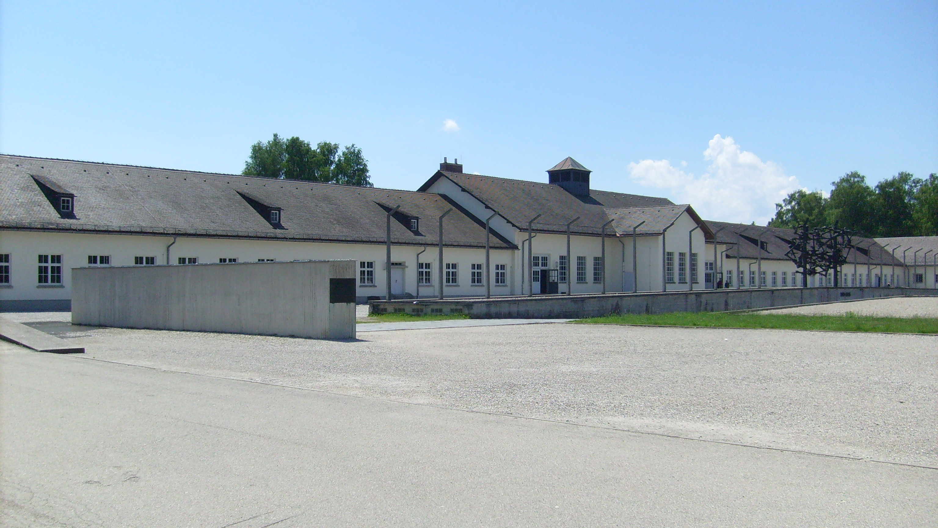 06.06.2010. _ Dachau / KZ Gedenkstätte